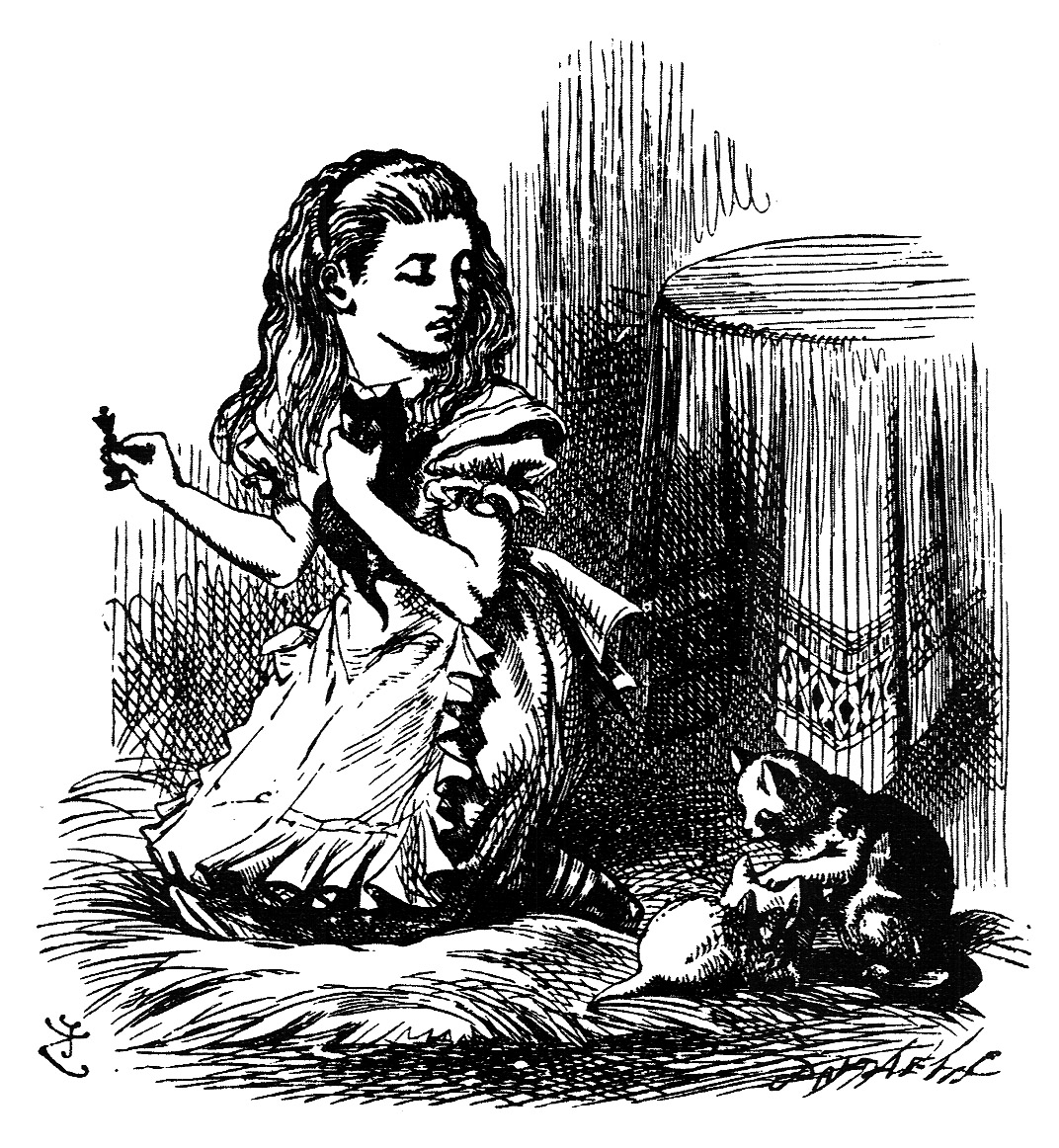 гравюра Джона Тенниела